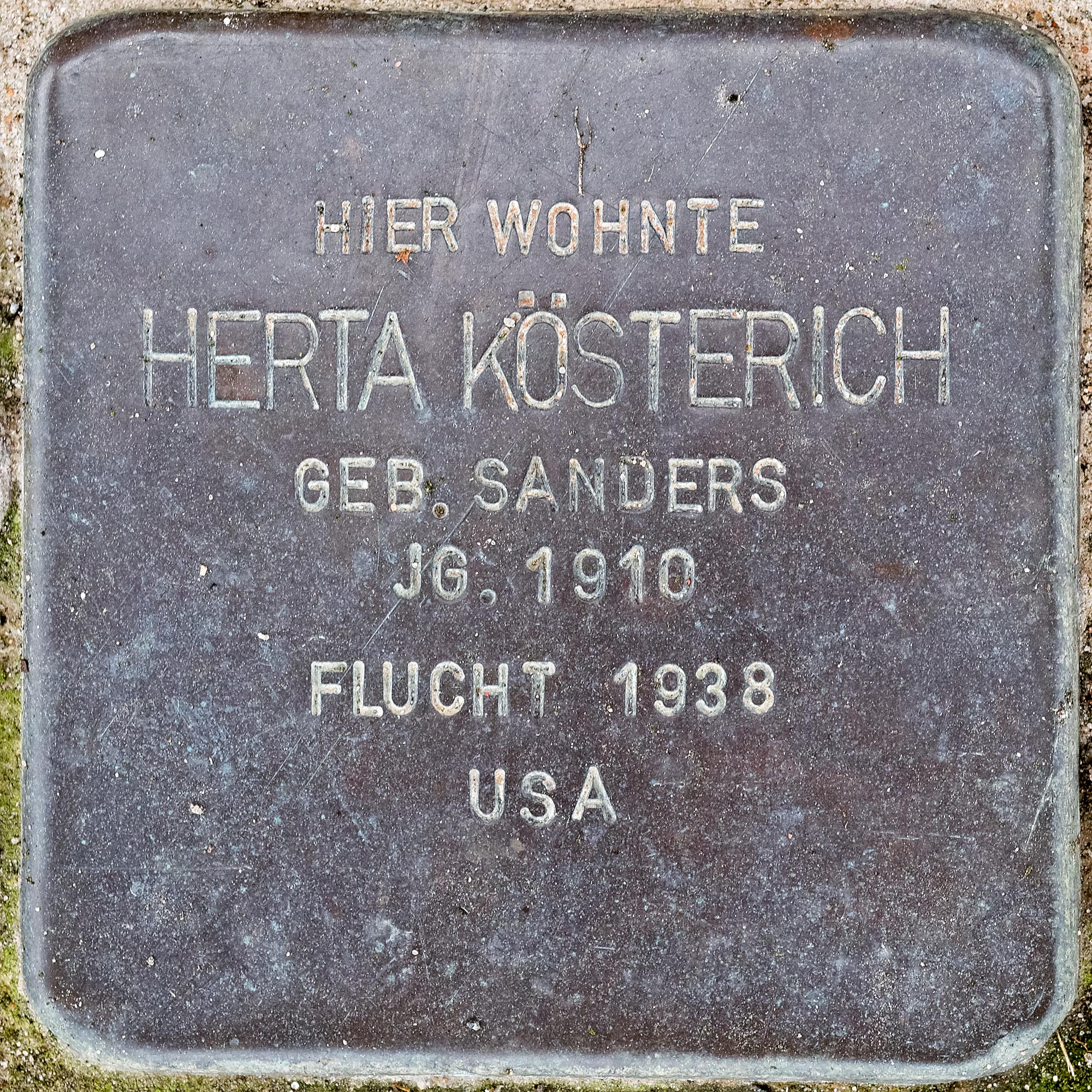 Stolperstein Koesterich, Herta